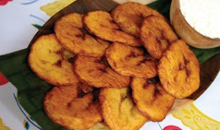 Tajadas de plátano frito.